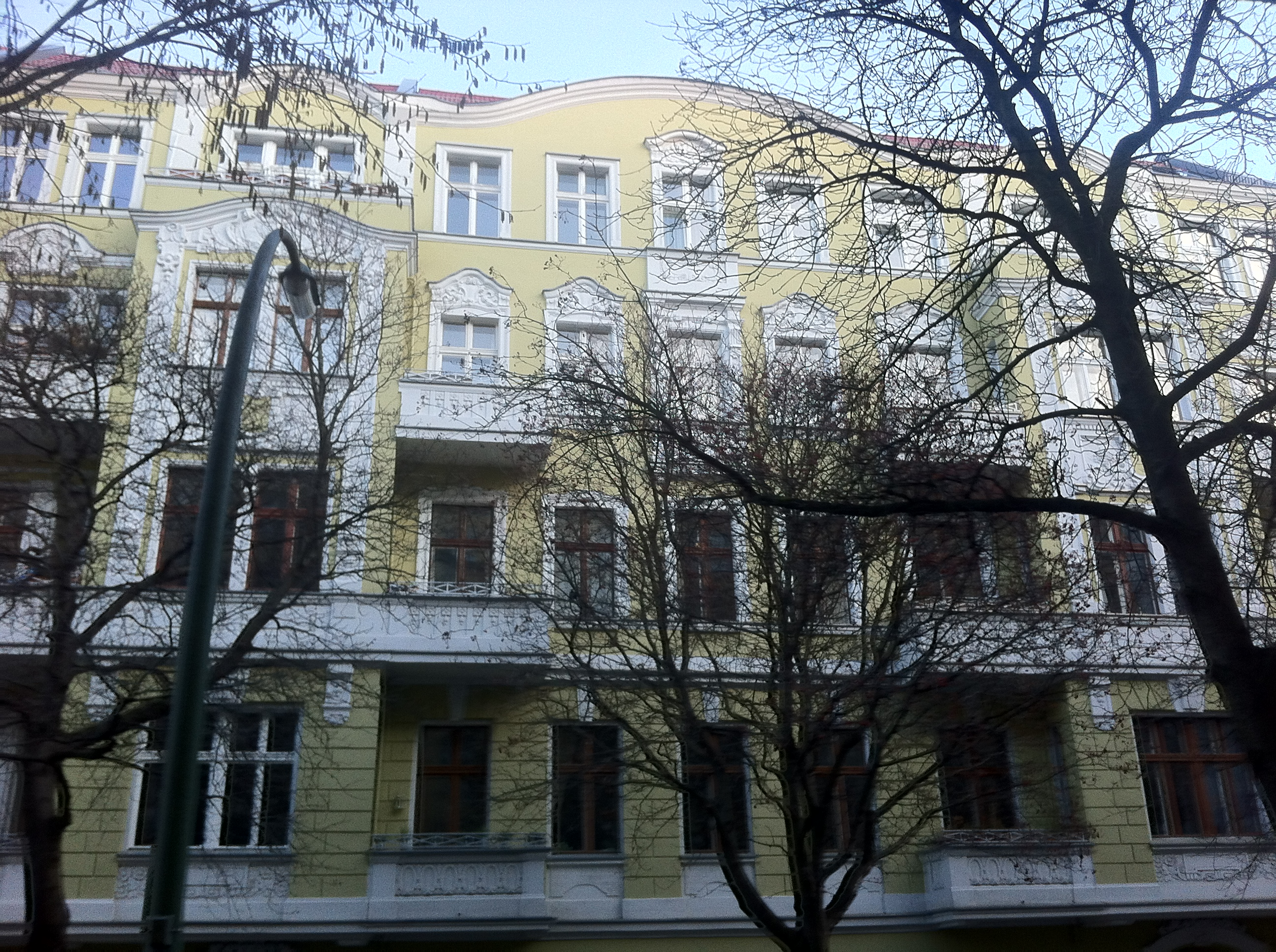 Mietshaus Gustav-Müller-Str. 45, Baudenkmal Nr. 09066512